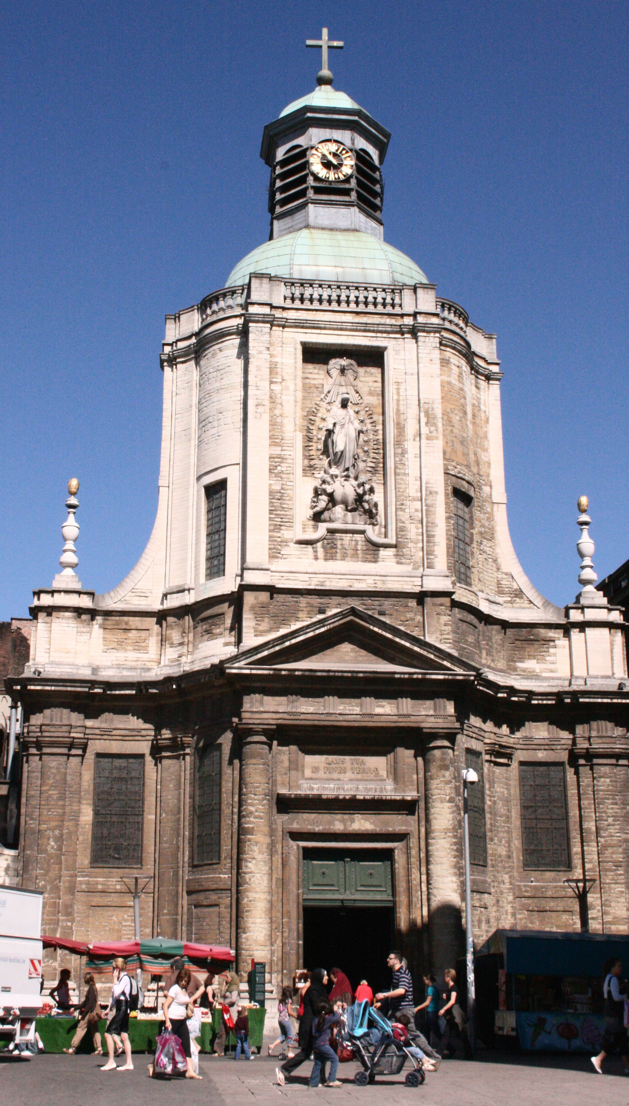 Eglise Notre-Dame du finistère, rue Neuve, Bruxelles (Belgique